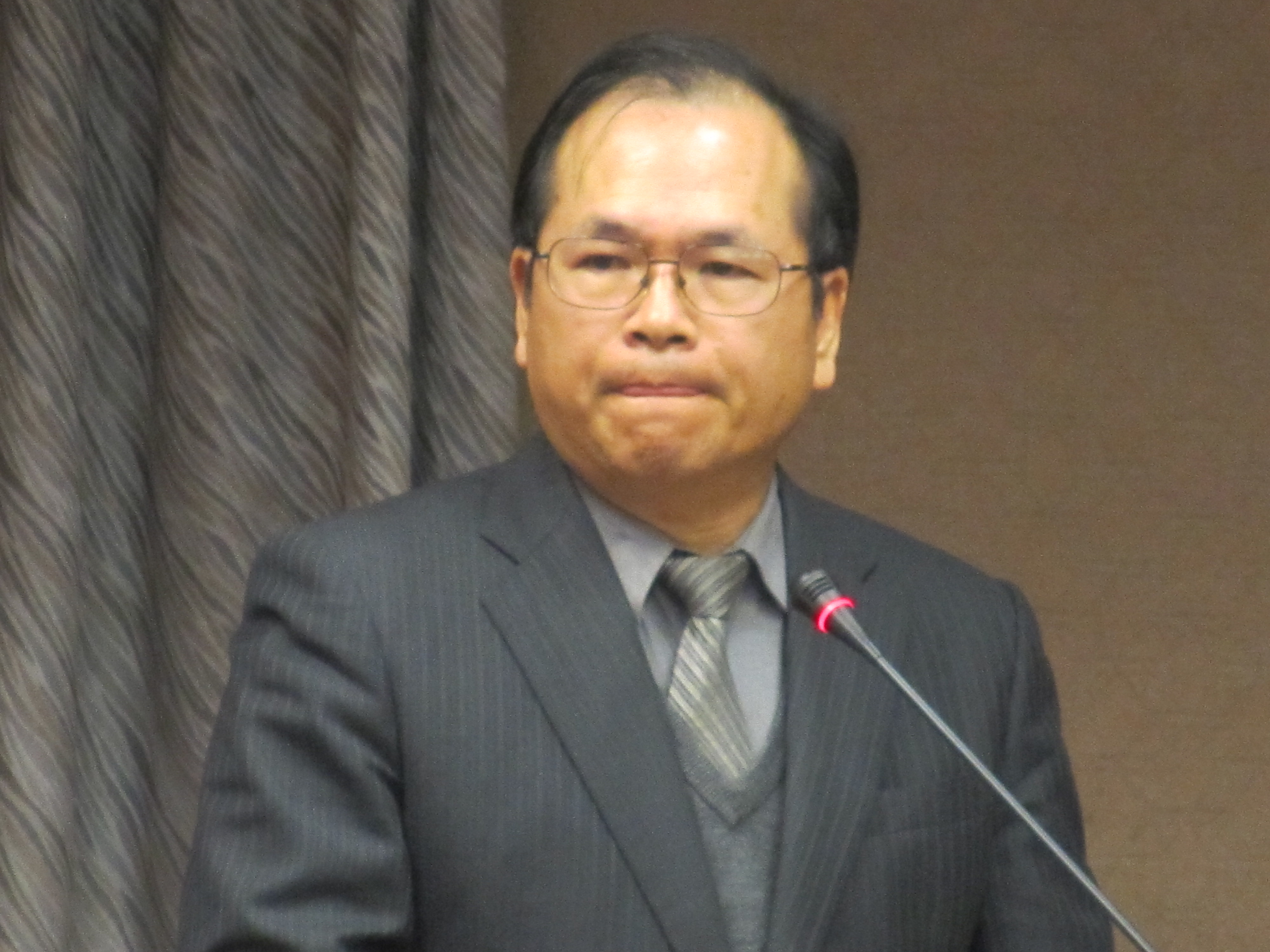 中文（台灣）: 台灣陸委會副主委林祖嘉（美國之音張永泰拍攝）